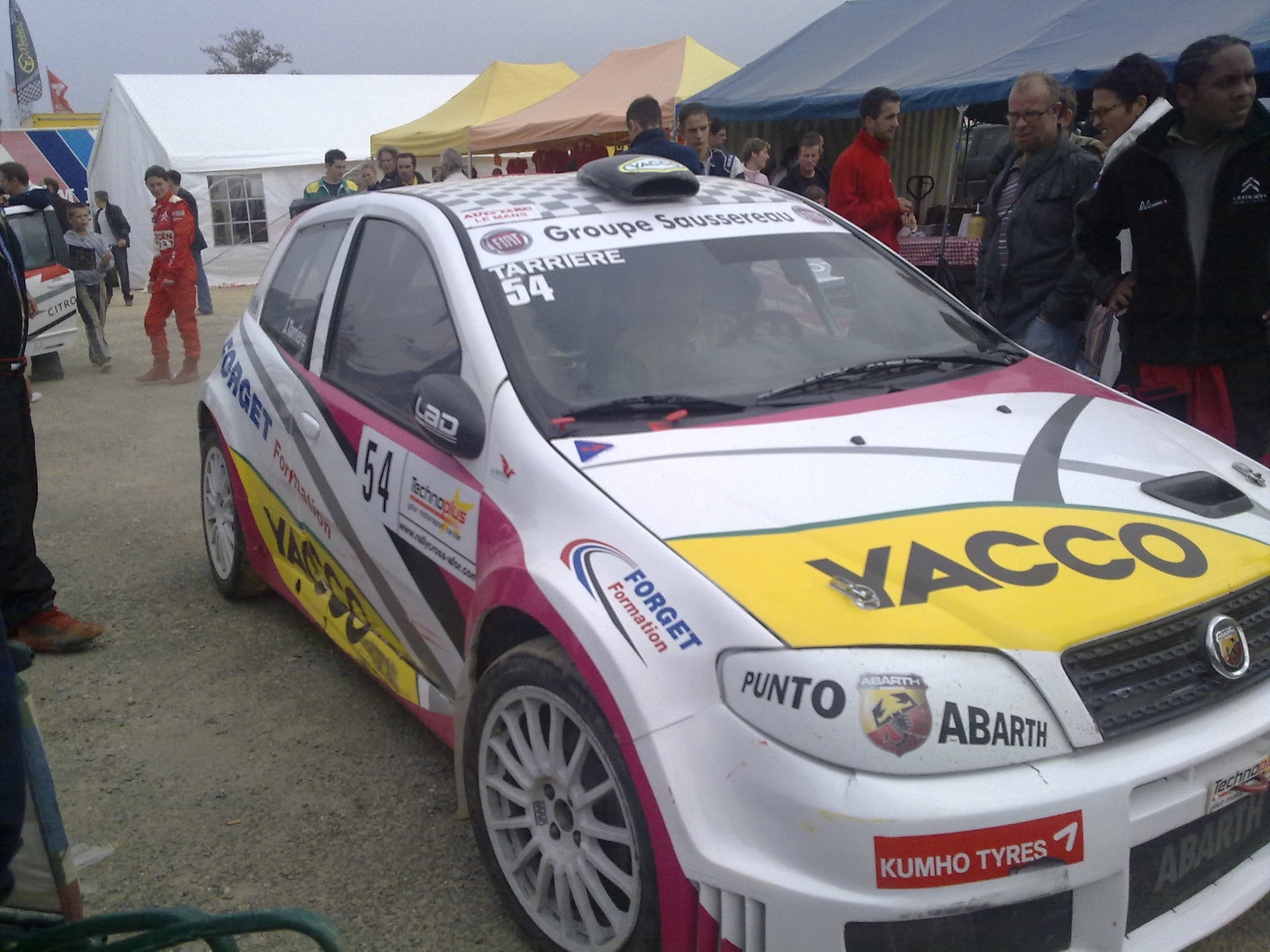 l'Abarth de rallycross de Jessica Tarrière septembre 2009